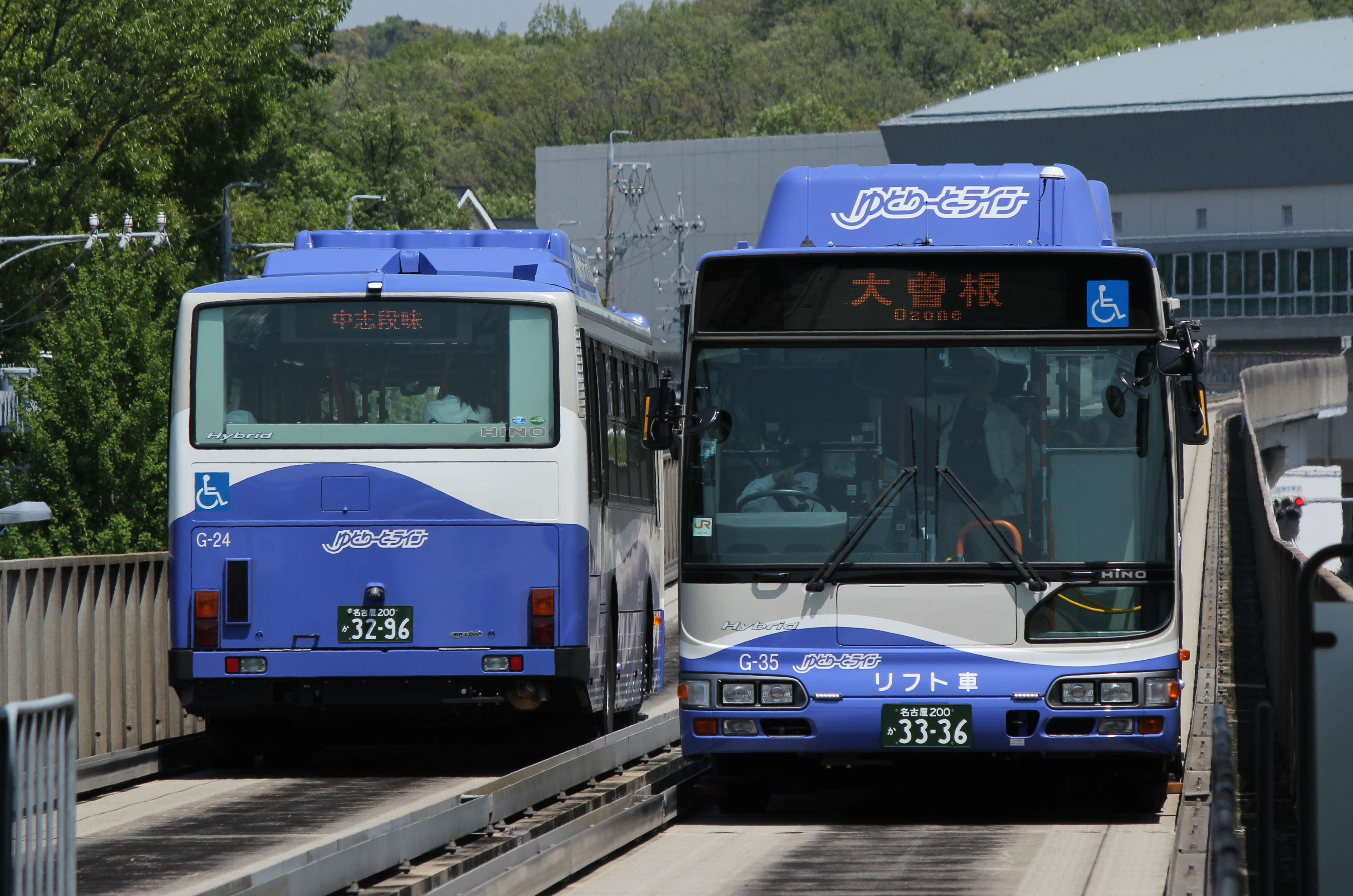 名古屋ガイドウェイバス